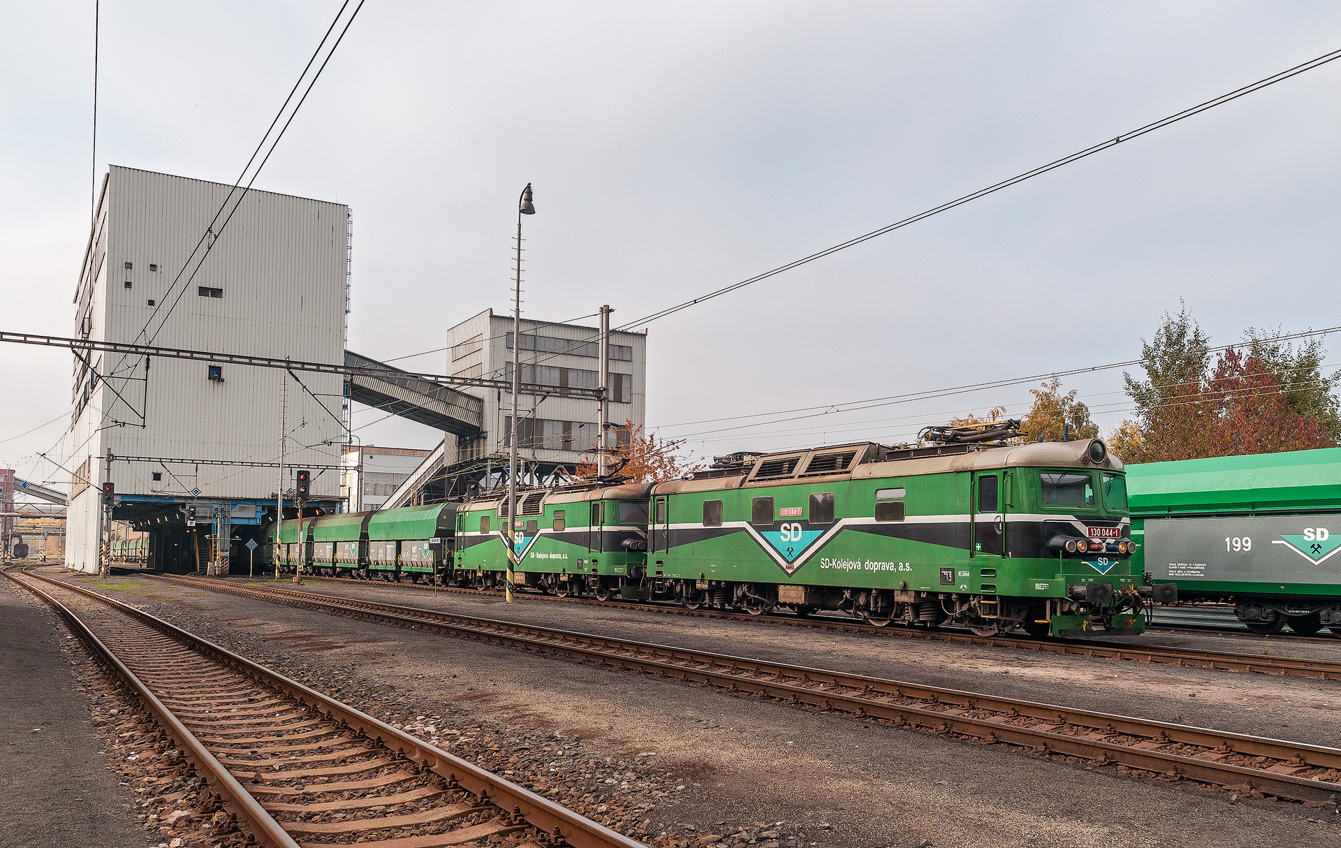 Dvojice lokomotiv řady 130, přezdívaná „Ufo“, při nakládce soupravy pro Elekrárnu Prunéřov v dopravně T1 v Tušimicích.